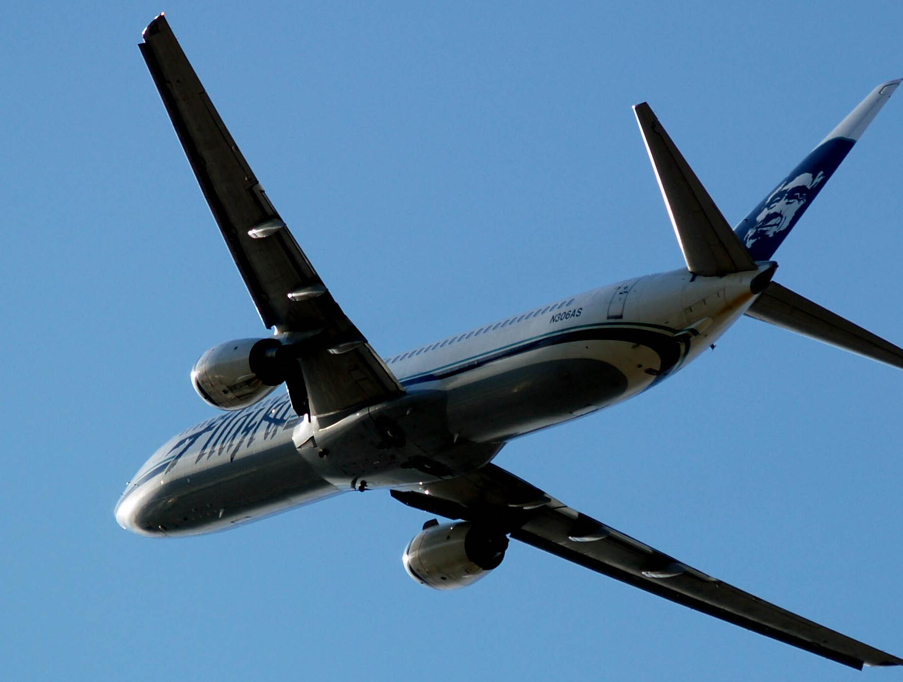 Alaska Airlines Boeing 737-990 N306AS